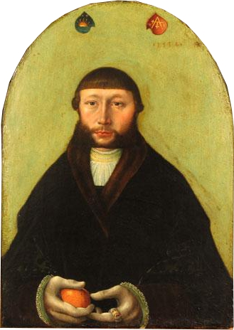 The merchant Hans Sonnenschein († 1533) from Lübeck